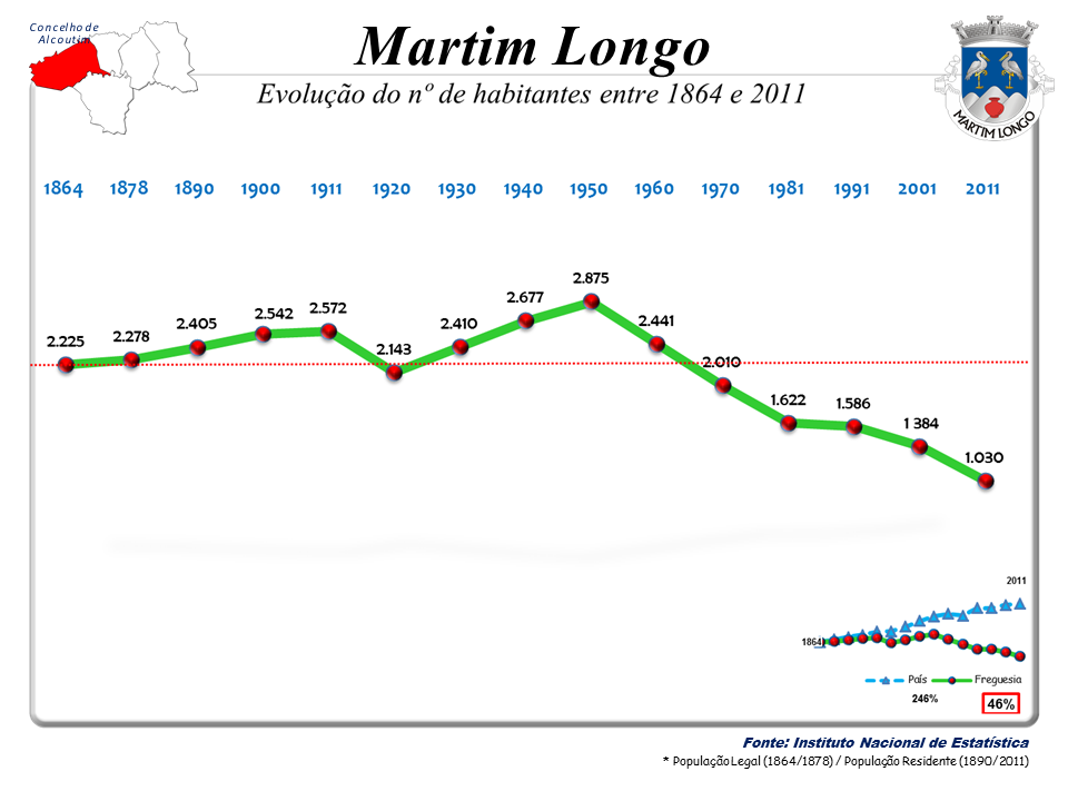 Censos 1864/2011